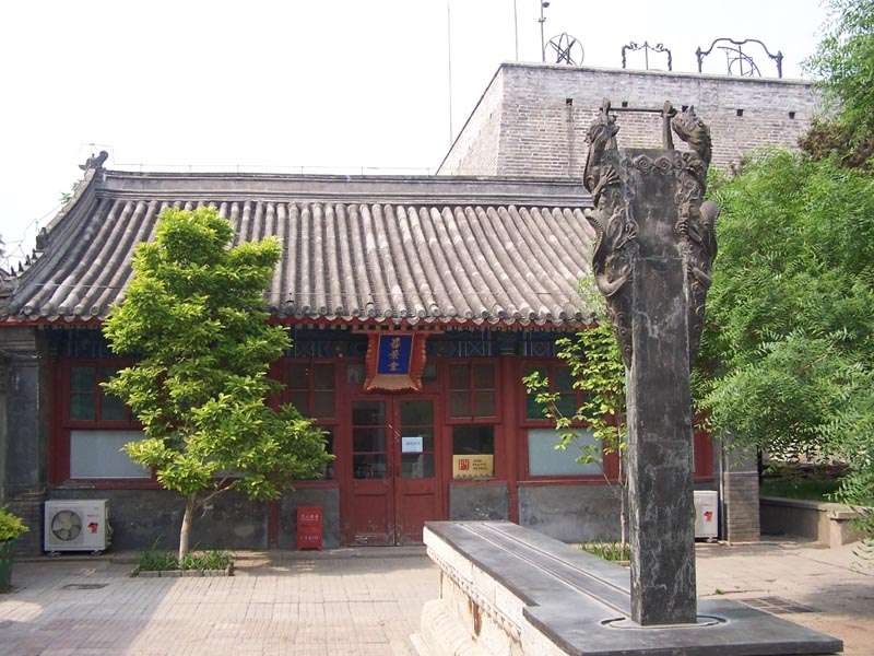 instrument in Beijing Ancient Observatory